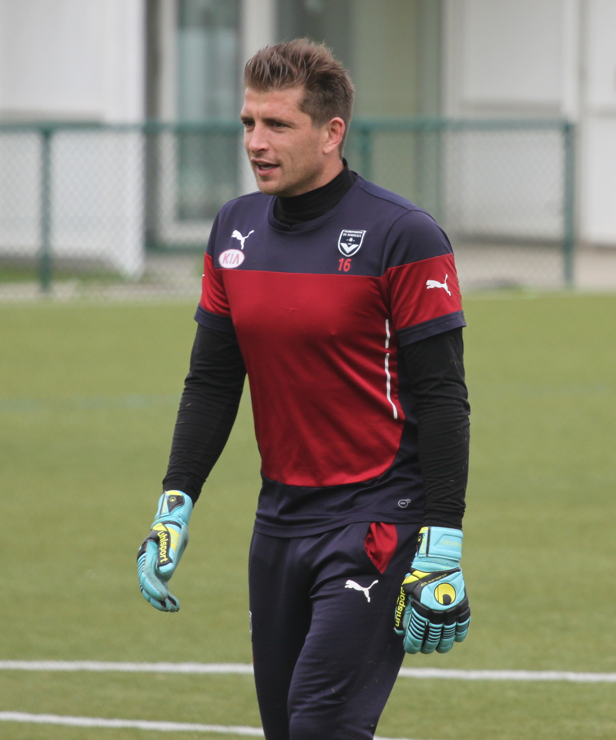 Carrasso à l'entraînement.